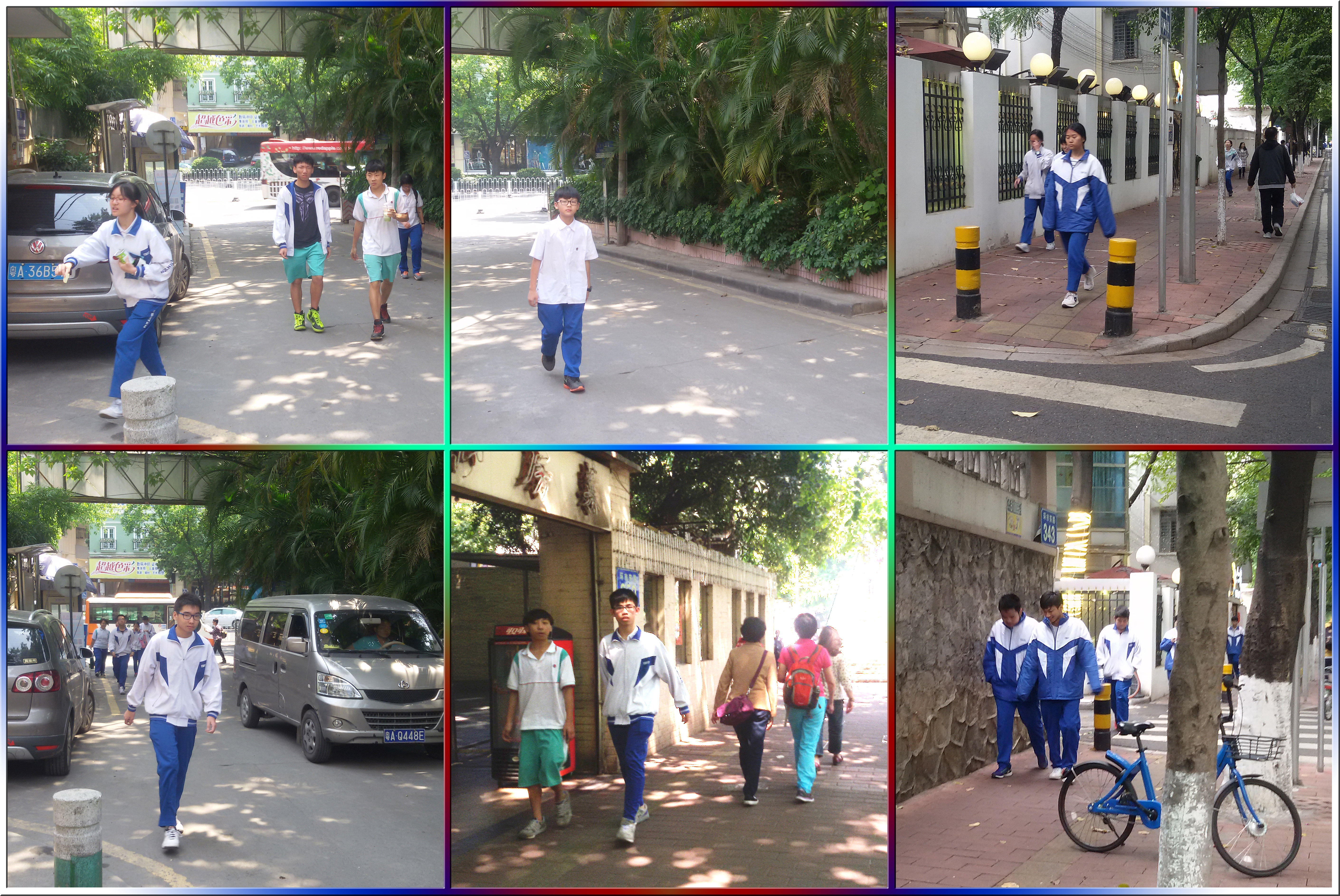 粵語: 廣州市第廿一中學嘅各种校服